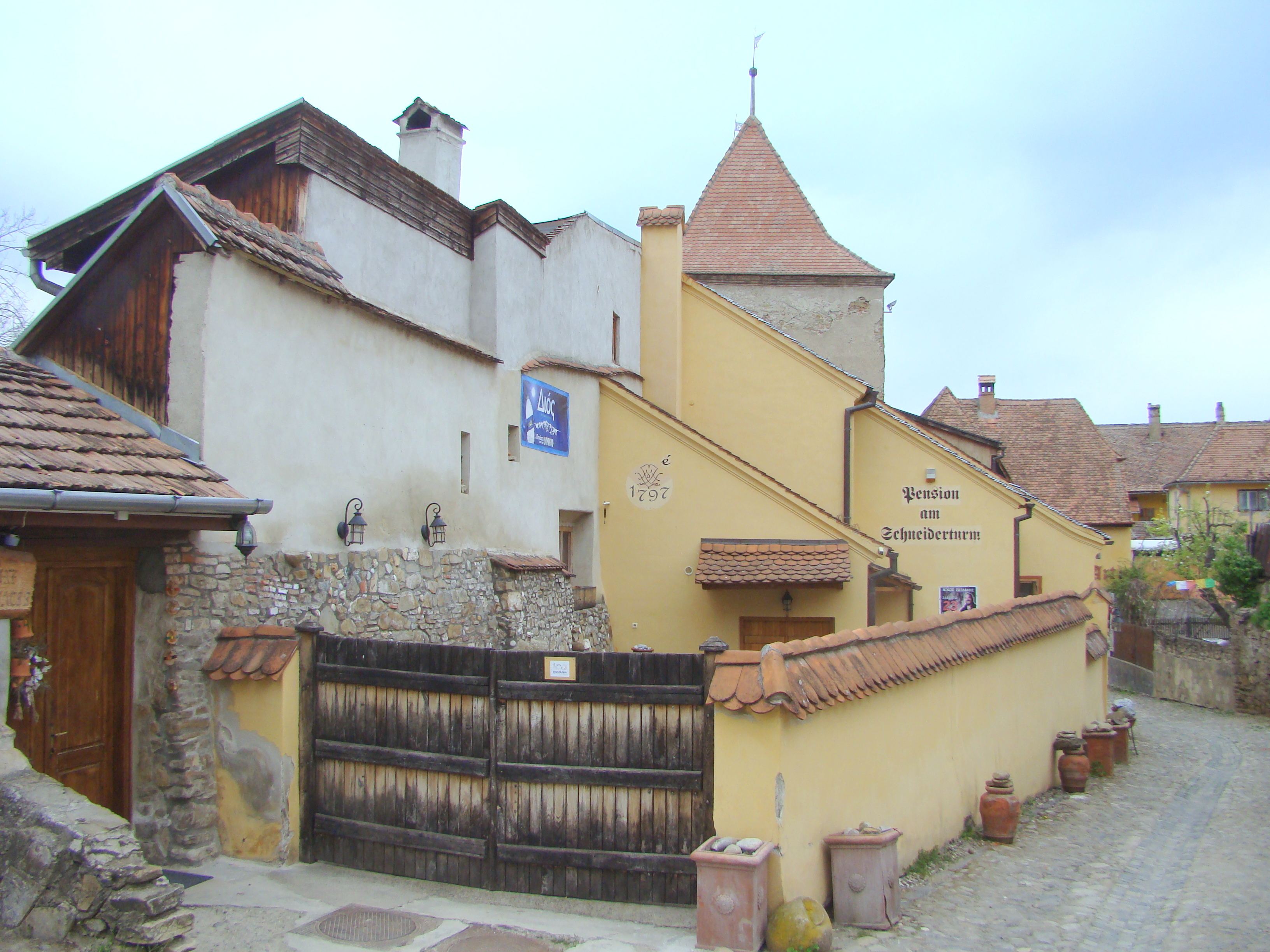 Casă, municipiul Sighișoara, str. Zidul Cetății 4 1787, sec. XX